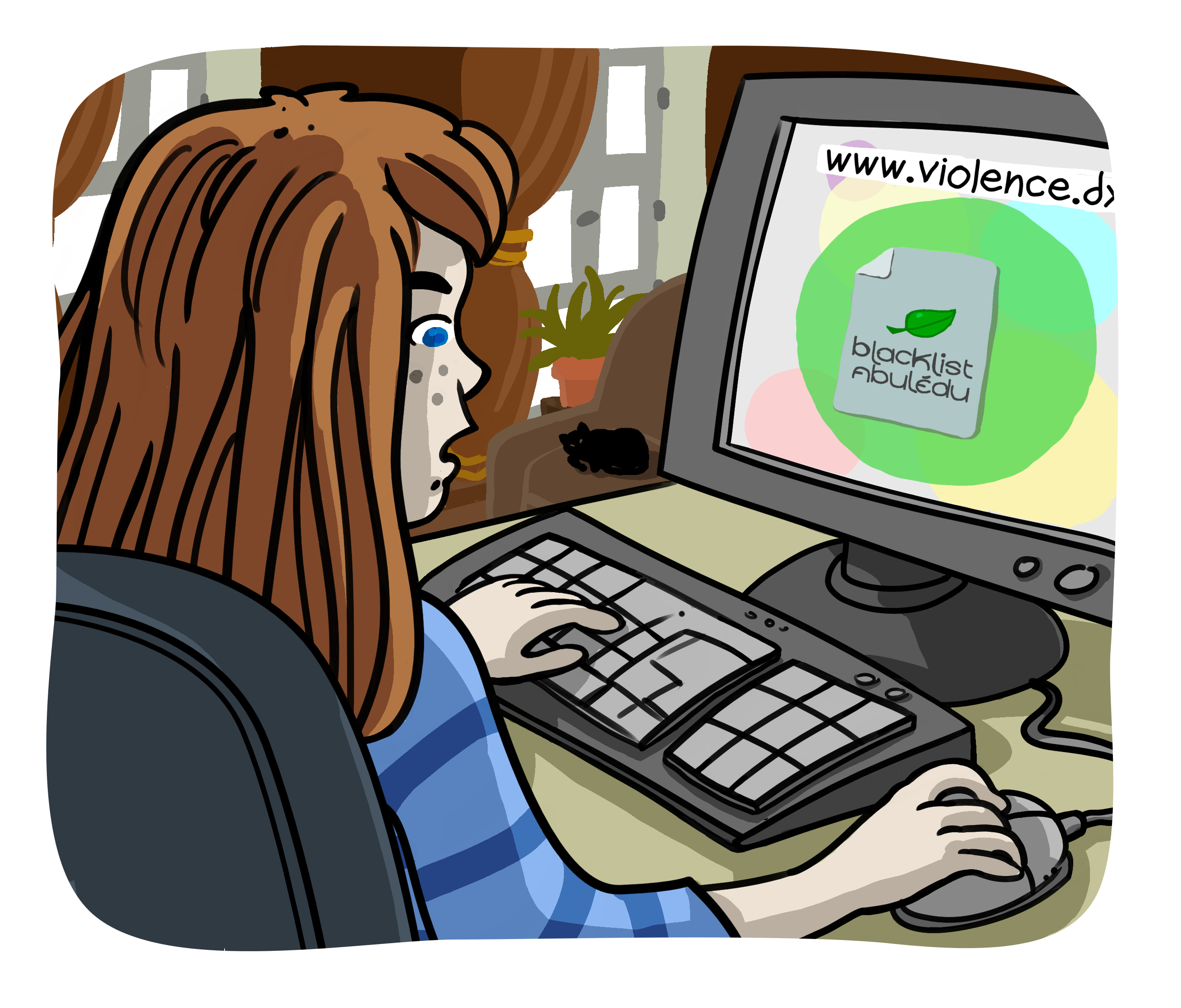 Arnaud Pérat, Censure AbulÉdu à la maison.